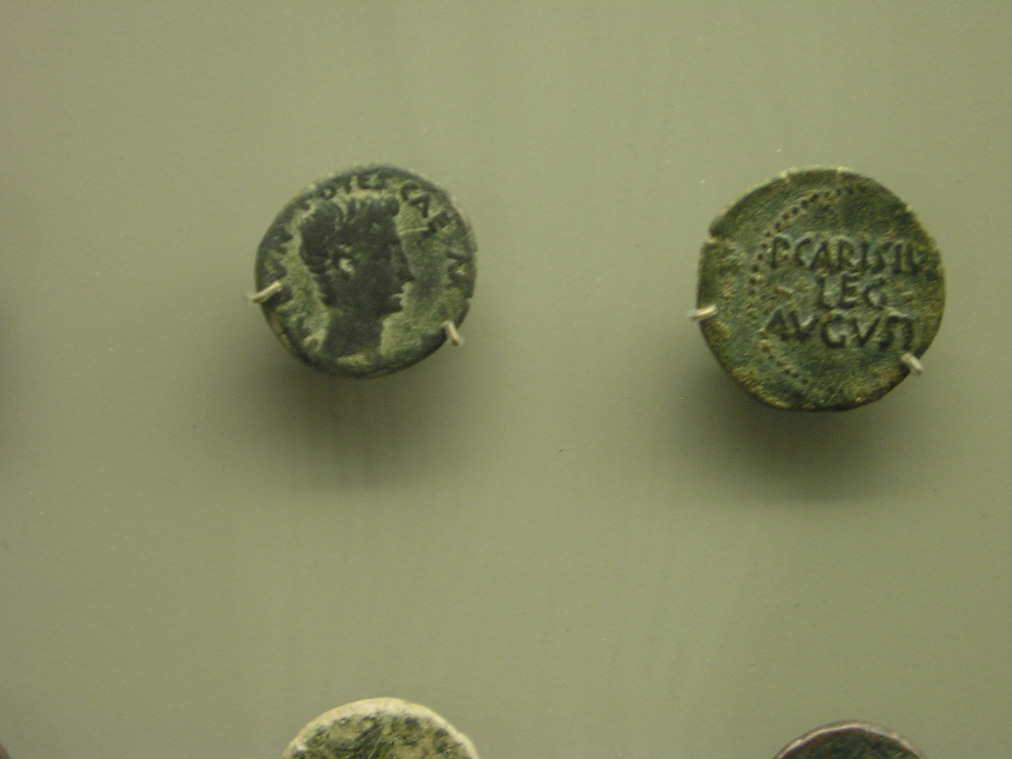 Denario emitido en la ceca de Emerita Augusta (Mérida, badajoz, españa) procedente de Mérida y depositado en el Museo Nacional de Arte Romano. A/ Cabeza de Augusto a la derecha. IMP CAESAR D. F AVG TRIB POTES R/ Rueda de puntos. P. CARISIVS LEG AVGVSTI